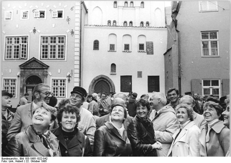 ADN-ZB Link 22.10.85 UdSSR: Ankunft der "Arkona" Nach 37stündiger Seereise von Leningrad kommend, erreichte die "Arkona" mit 580 Werktätigen aus der DDR an Bord die lettische Hauptstadt Riga. Helga Baeskow, Waltraud Donay und Erika Kotzerke aus dem VEB Textil- und Konfektionsbetriebe Cottbus (vlnr) besuchten zusammen mit einem Teil der Passagiere die historische Altstadt.